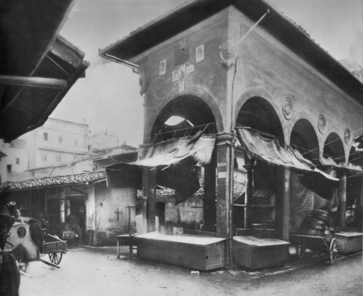 Loggia del pesce before 1880